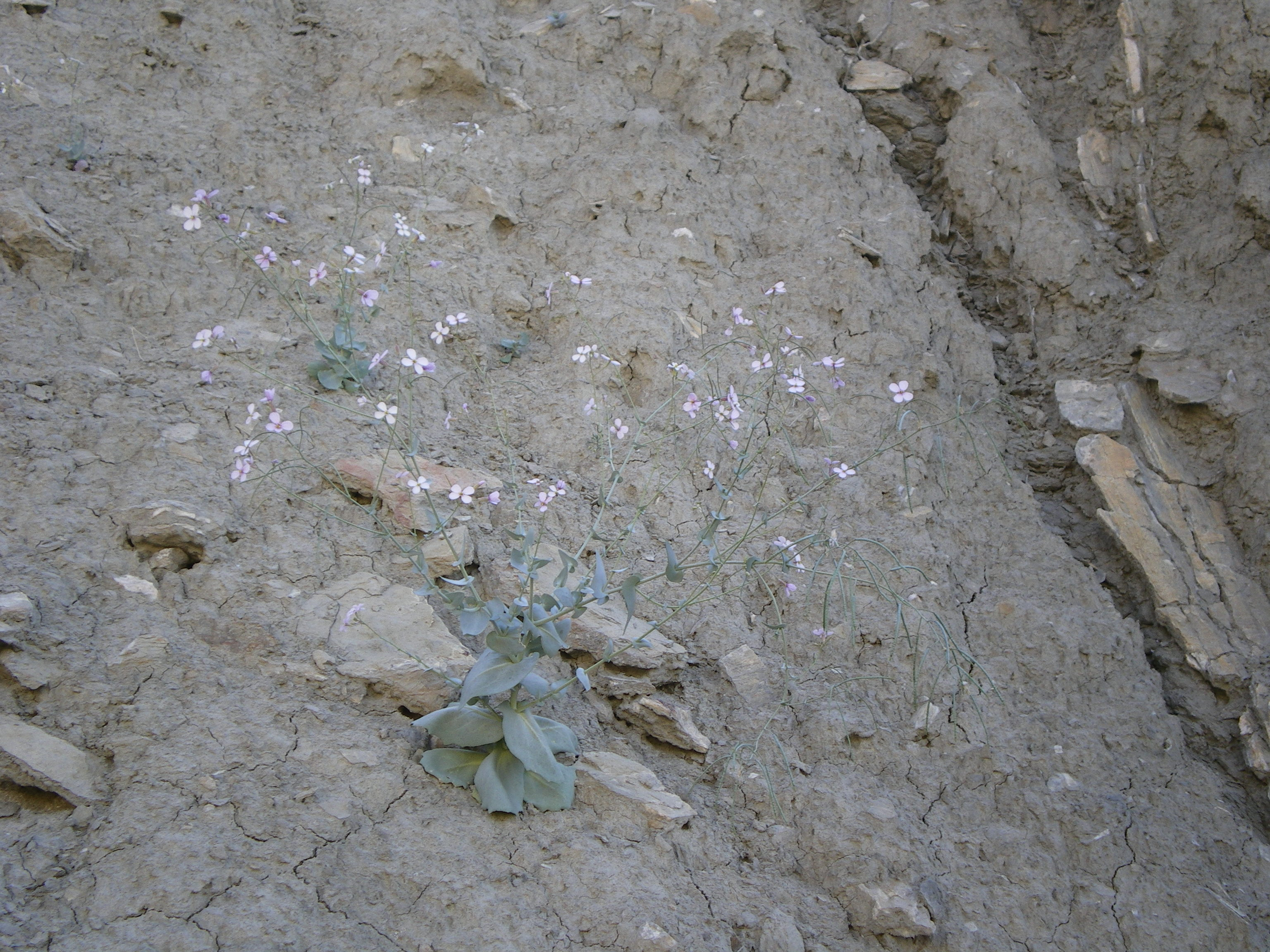 Fotografía de vista general de Moricandia foetida, planta perenne de la familia de las Crucíferas o Brassicáceas, tomada en el subdesierto de Tabernas, provincia de Almería, España.